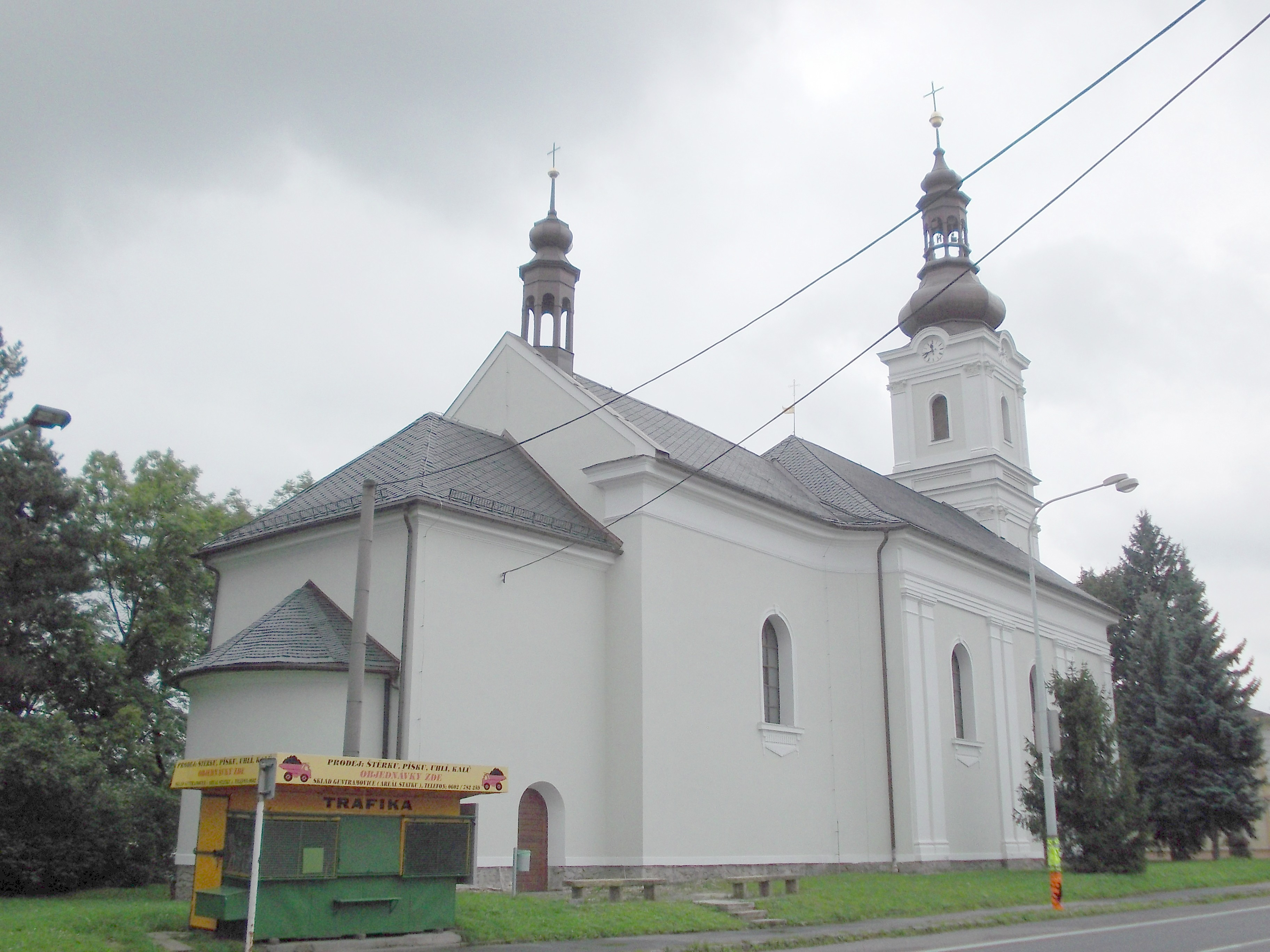 Kostel svatého Benedikta, Bruntálská, Pod Bezručovým vrchem, Krnov.